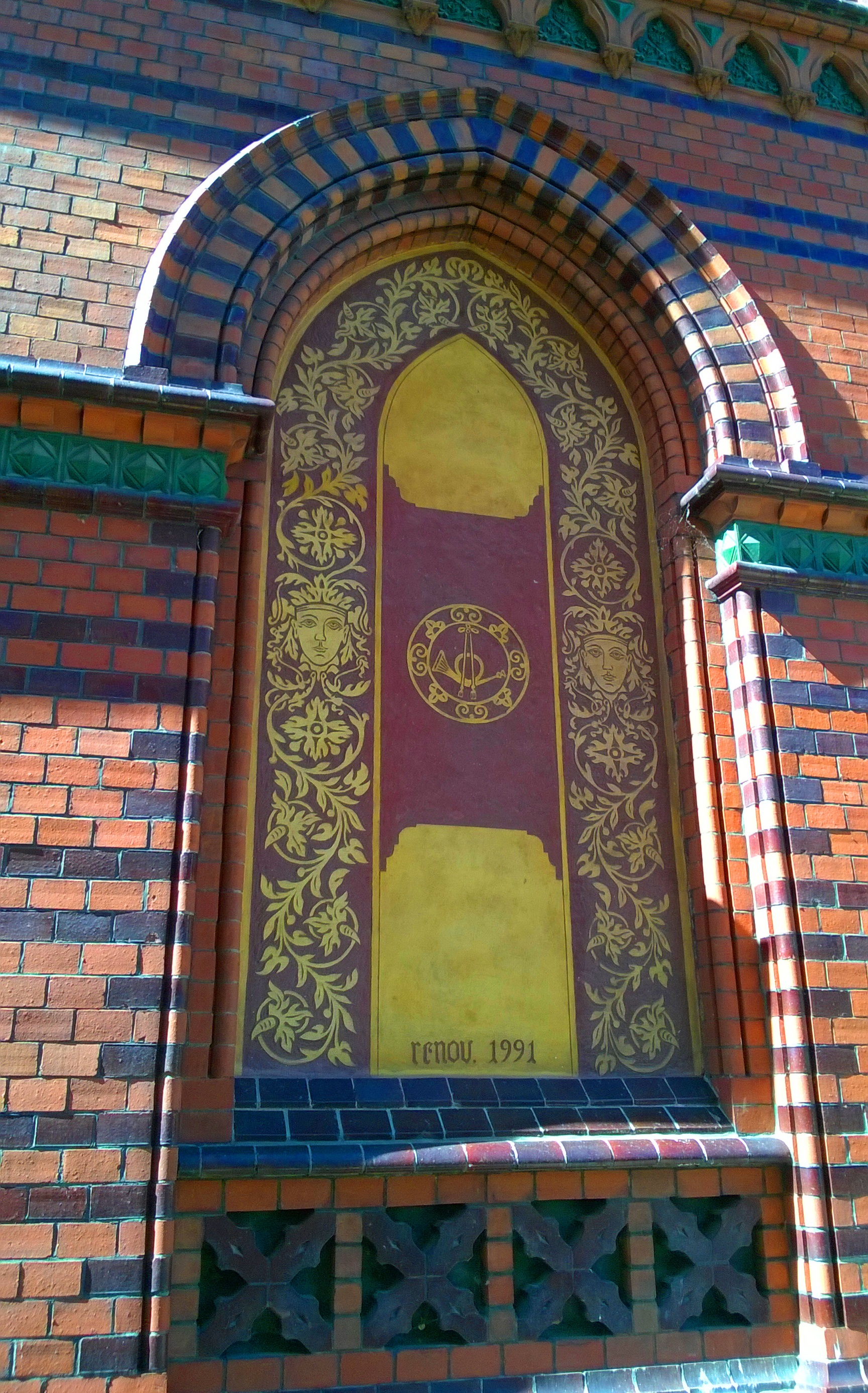 Poczta Główna w Toruniu, blęda